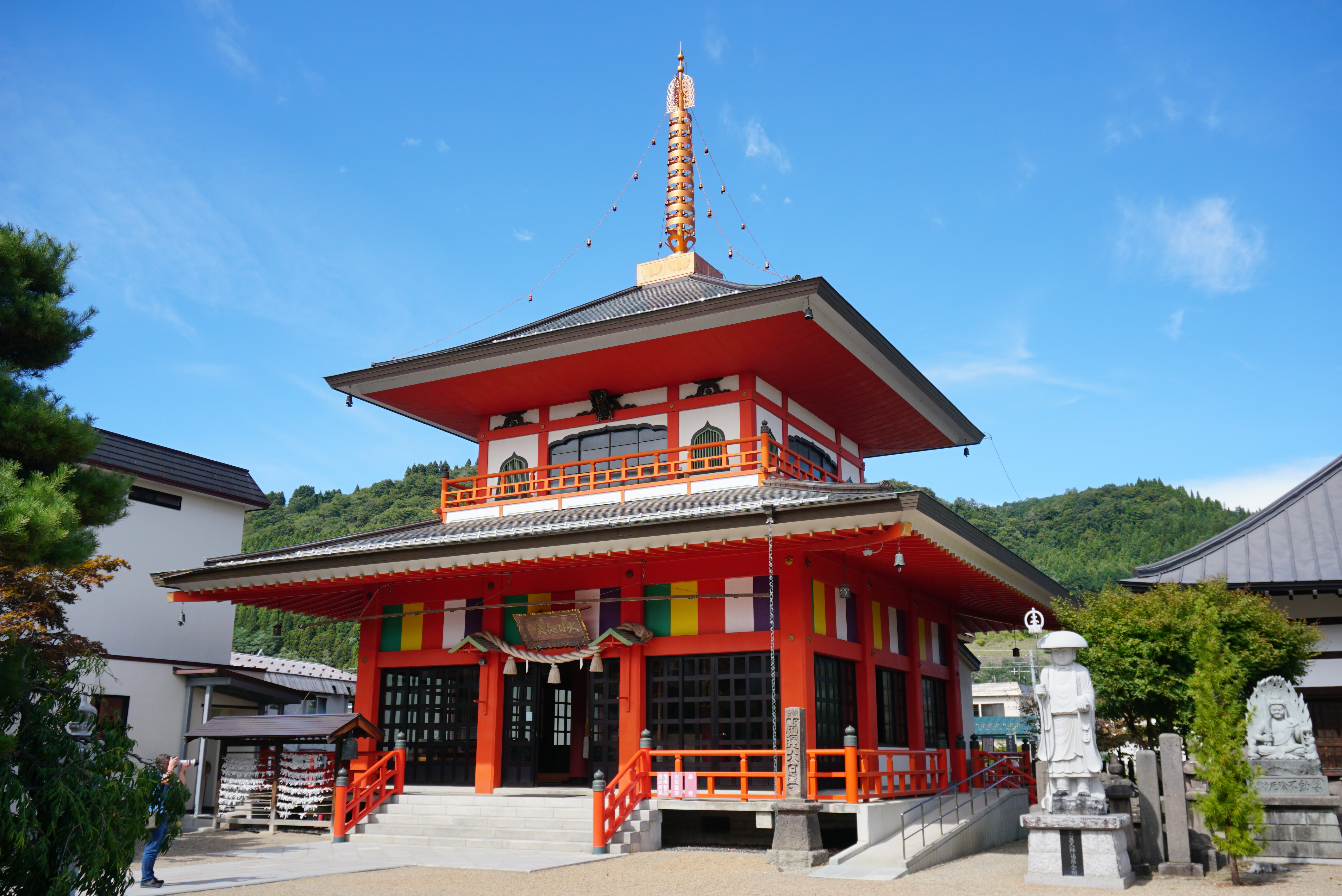 高野山真言宗 大圓寺（青森県南津軽郡大鰐町）